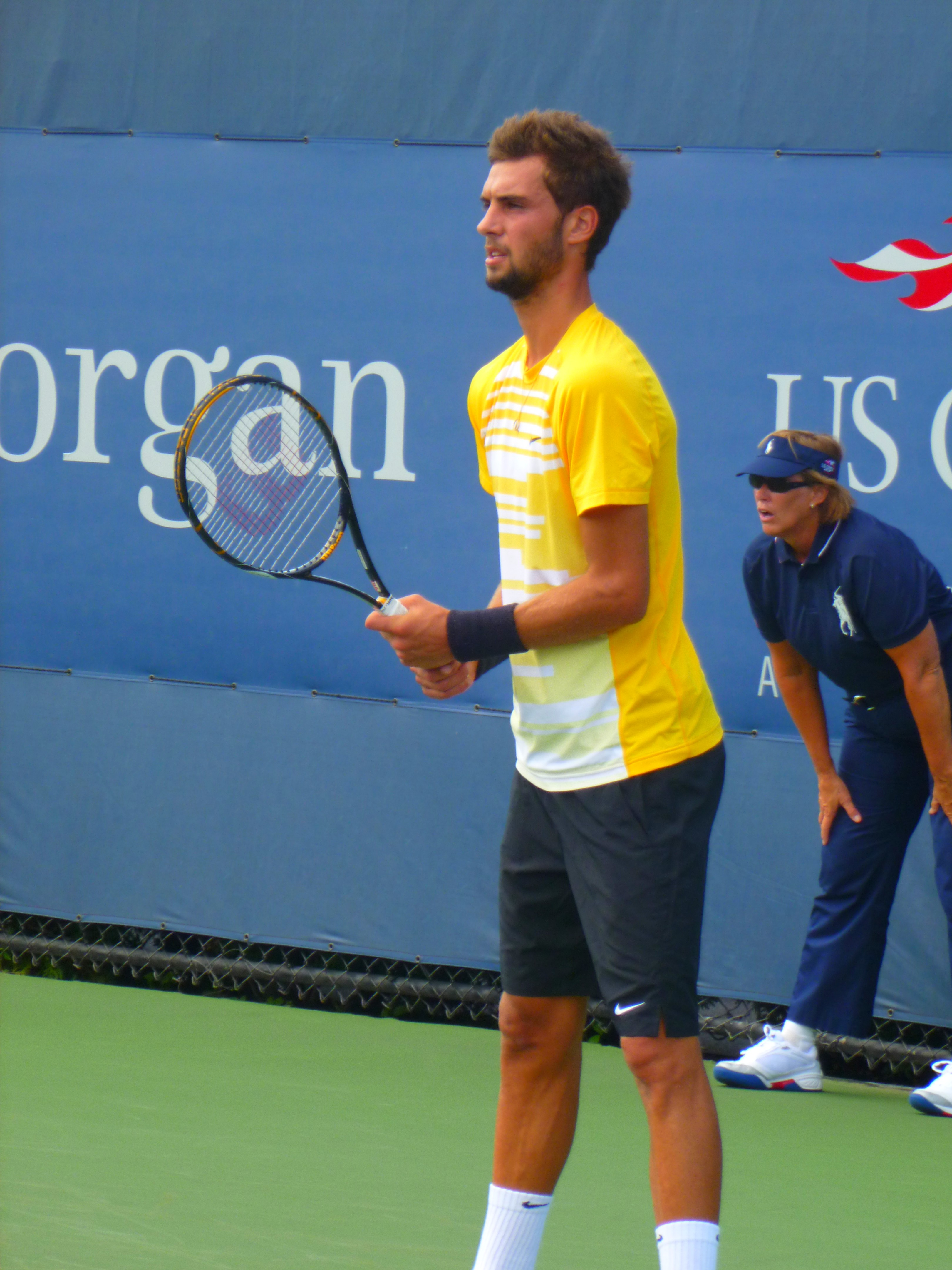 Benoit aux qualifs de l'US